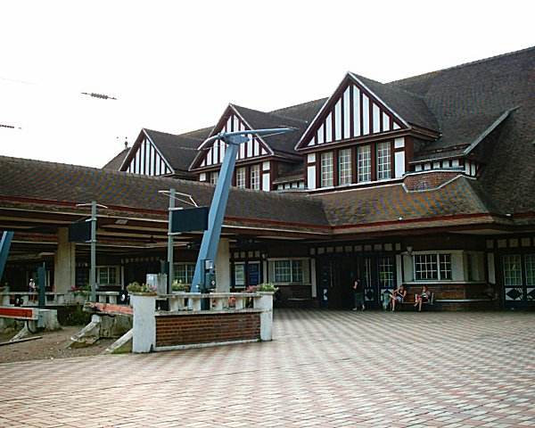 Gare de Trouville-Deauville, in 2004.